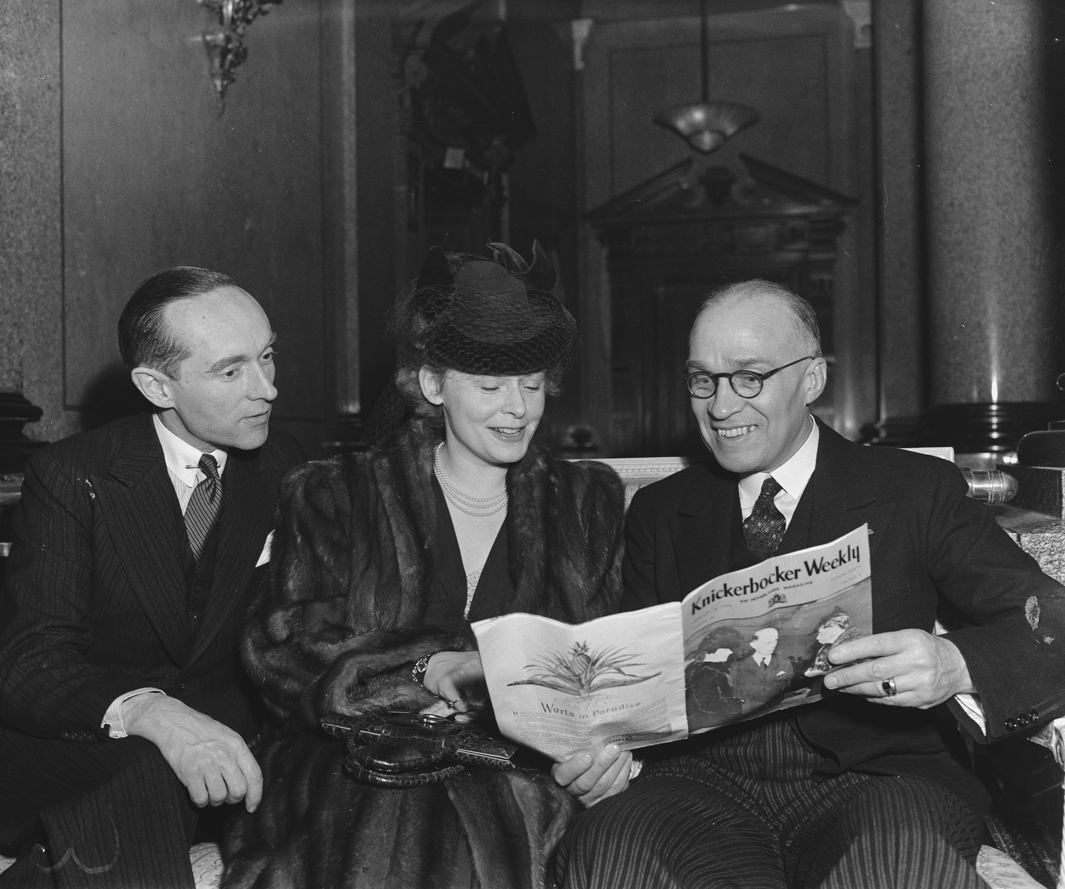 Collectie / Archief : Fotocollectie Anefo Reportage / Serie : [ onbekend ] Beschrijving : Minister Van Roijen , mevrouw Van Roijen en Minister Logeman Datum : 23 februari 1946 Persoonsnaam : Roijen van Mw Fotograaf : Raucamp, Koos / Anefo Auteursrechthebbende : Nationaal Archief Materiaalsoort : Glasnegatief Nummer archiefinventaris : bekijk toegang 2.24.01.09 Bestanddeelnummer : 901-4980